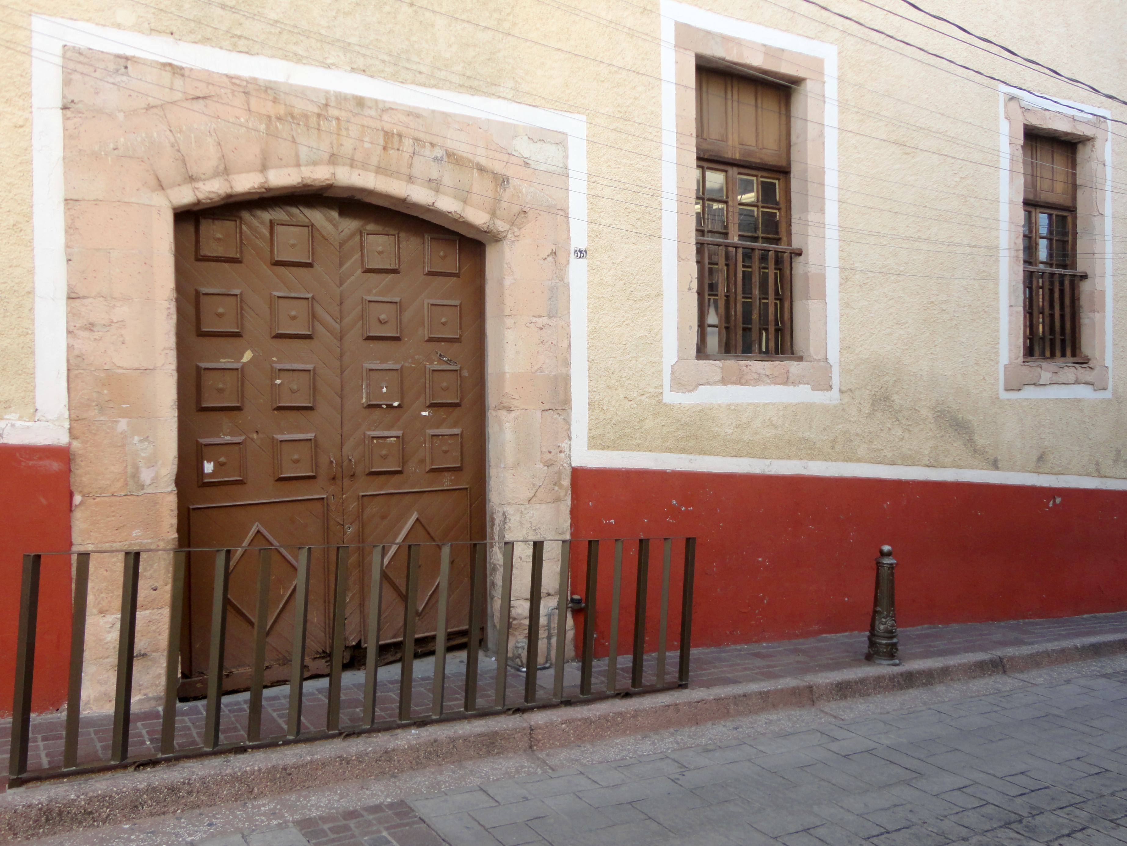 Escuela Primaria Urbana No. 6 "Juan B. Diosdado", Guanajuato Capital, Guanajuato, México.